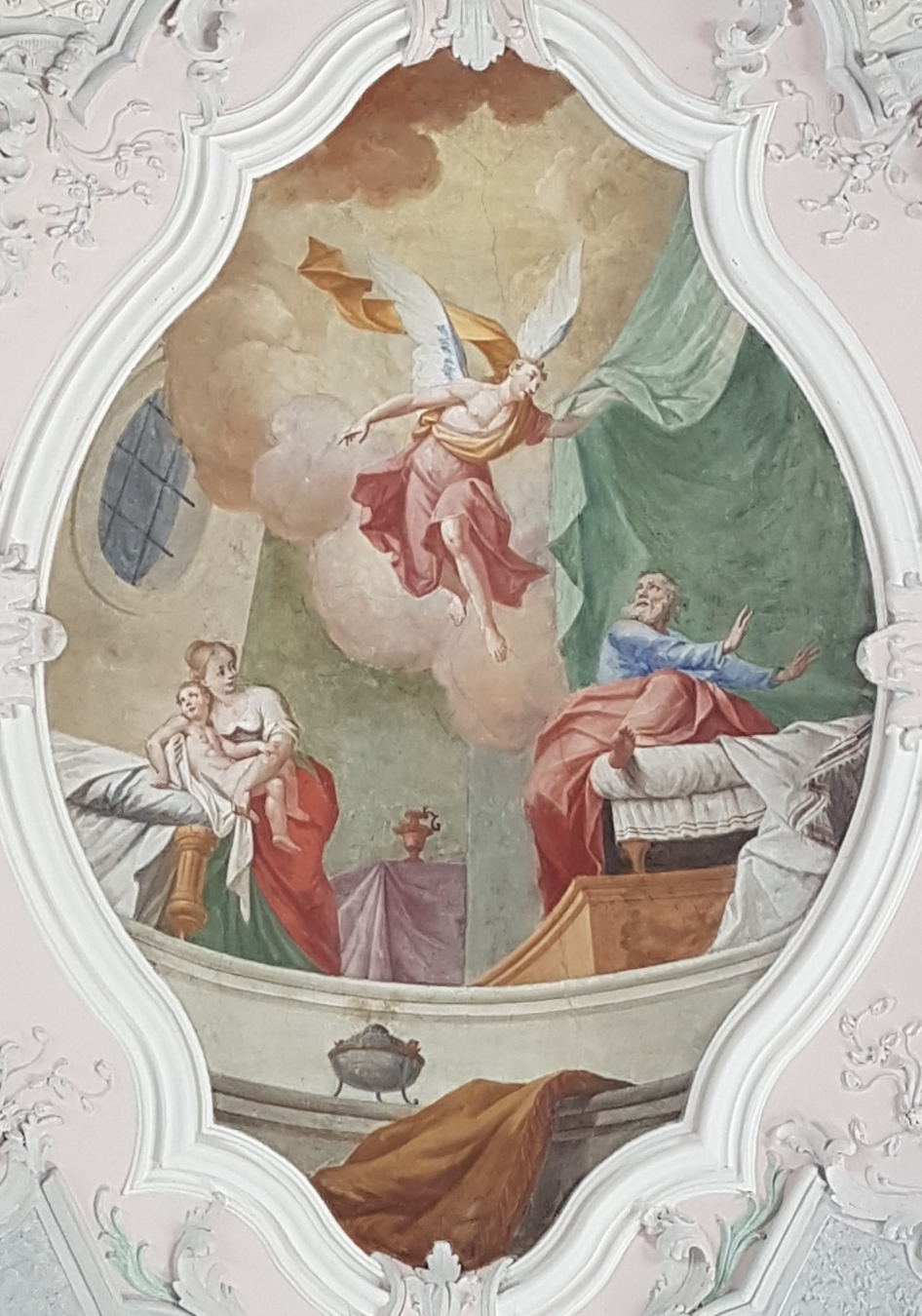 Pfarrkirche Sistrans, hinteres Langhausgewölbe